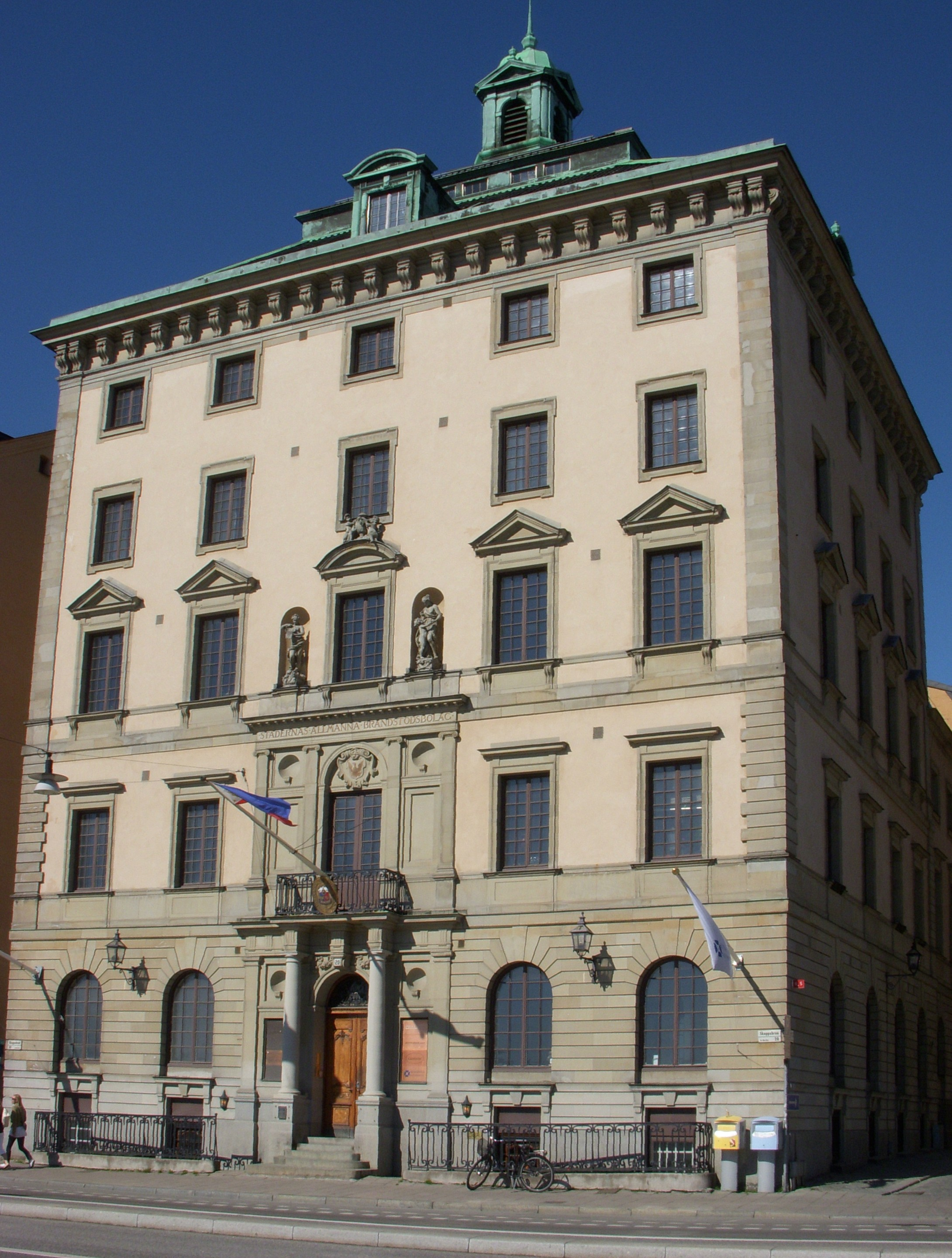 Skeppsbron 20, Stockholm